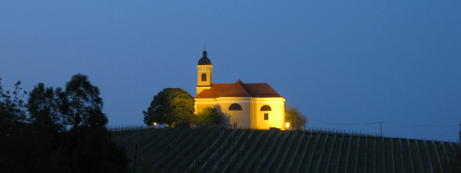 Kapelski vrh, village in Slovenia (church: St. Magdalena).